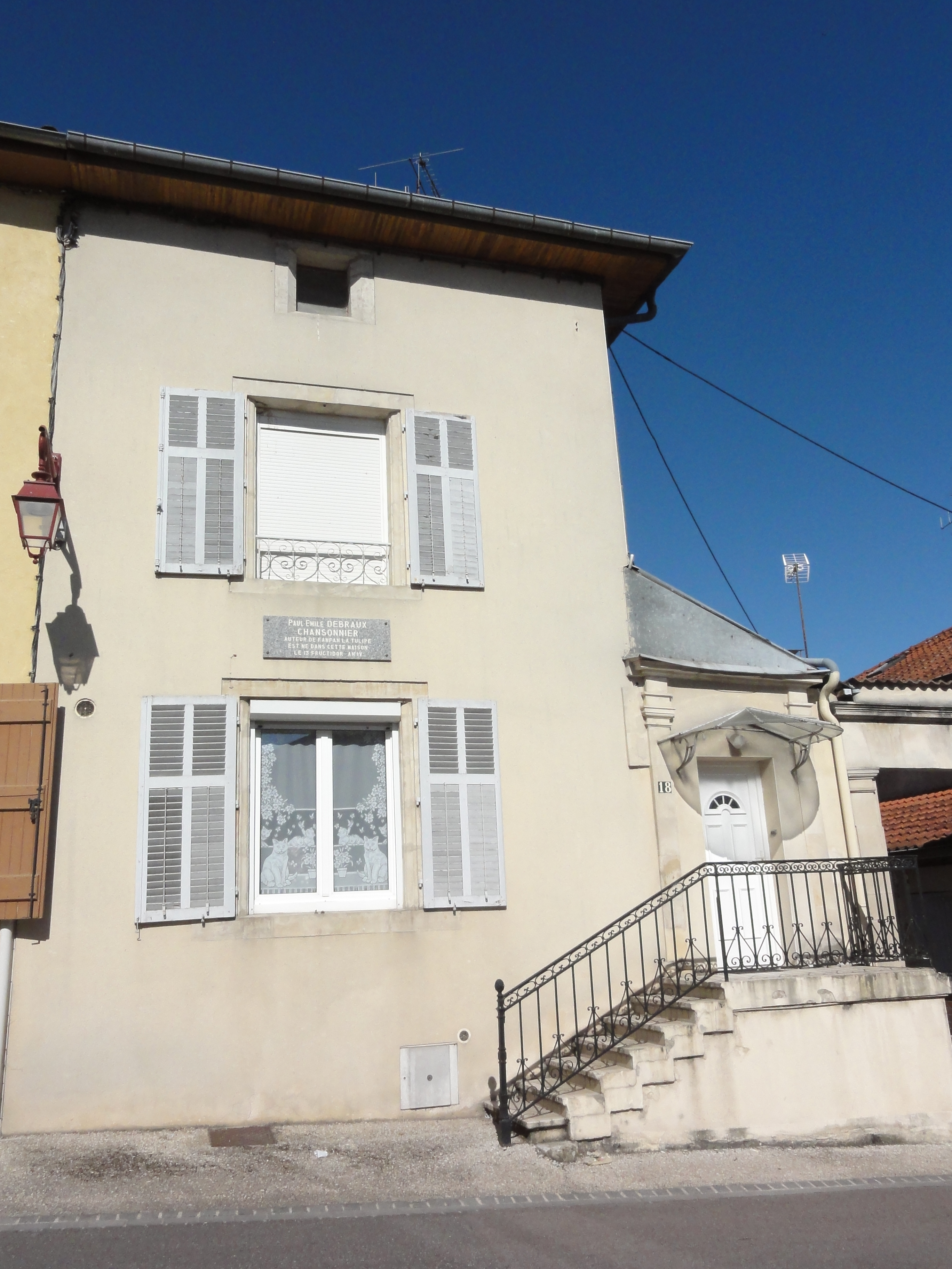 Ancerville (Meuse) maison natale Paul Emile Debraux